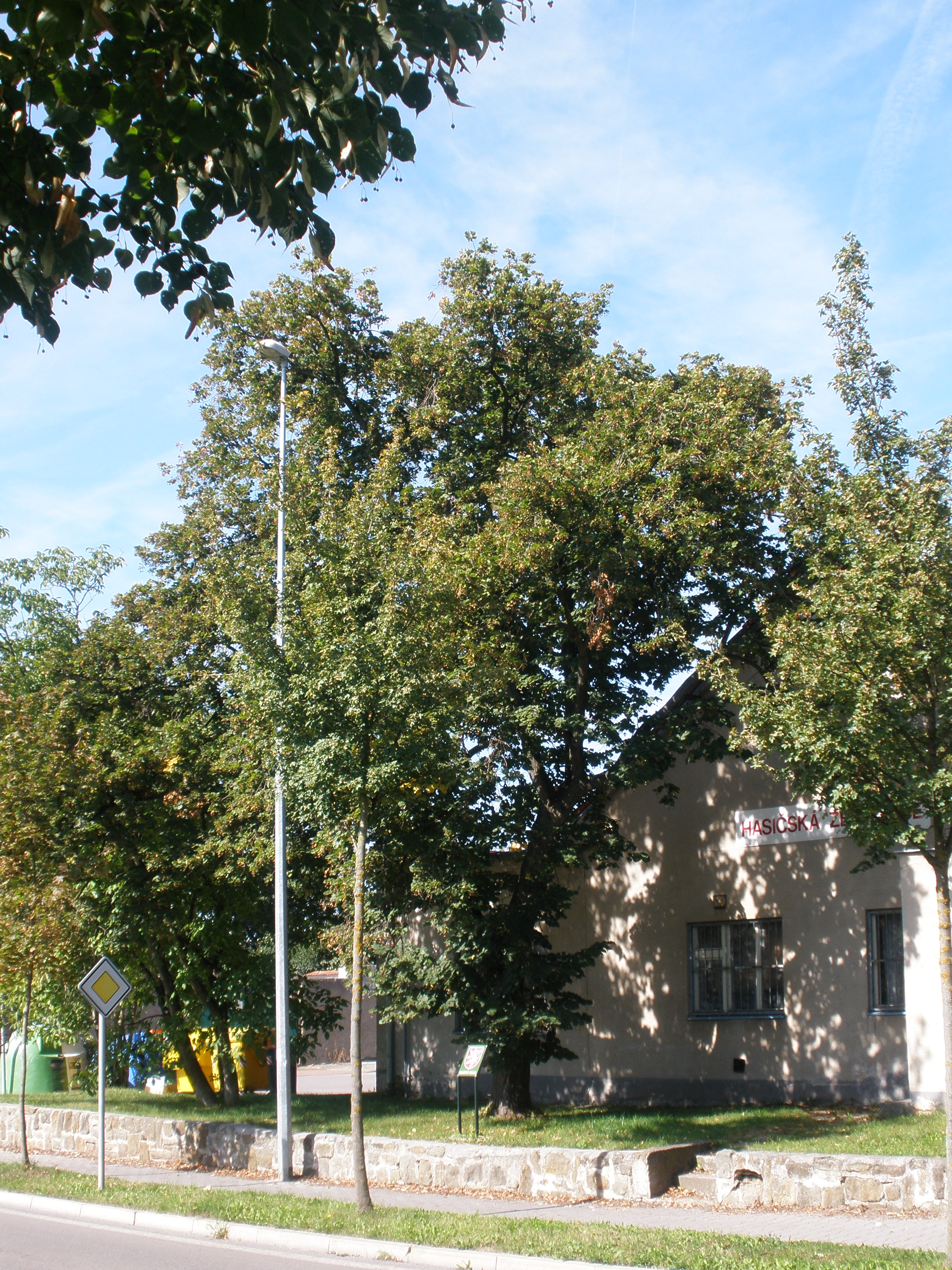 Fotografie památné lípy v Újezdě nad Lesy - pohled z boku